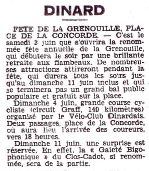 Programme de la fête de la Grenouille 1939 à Dinard avec la participation des bigophones de Saint-Malo.